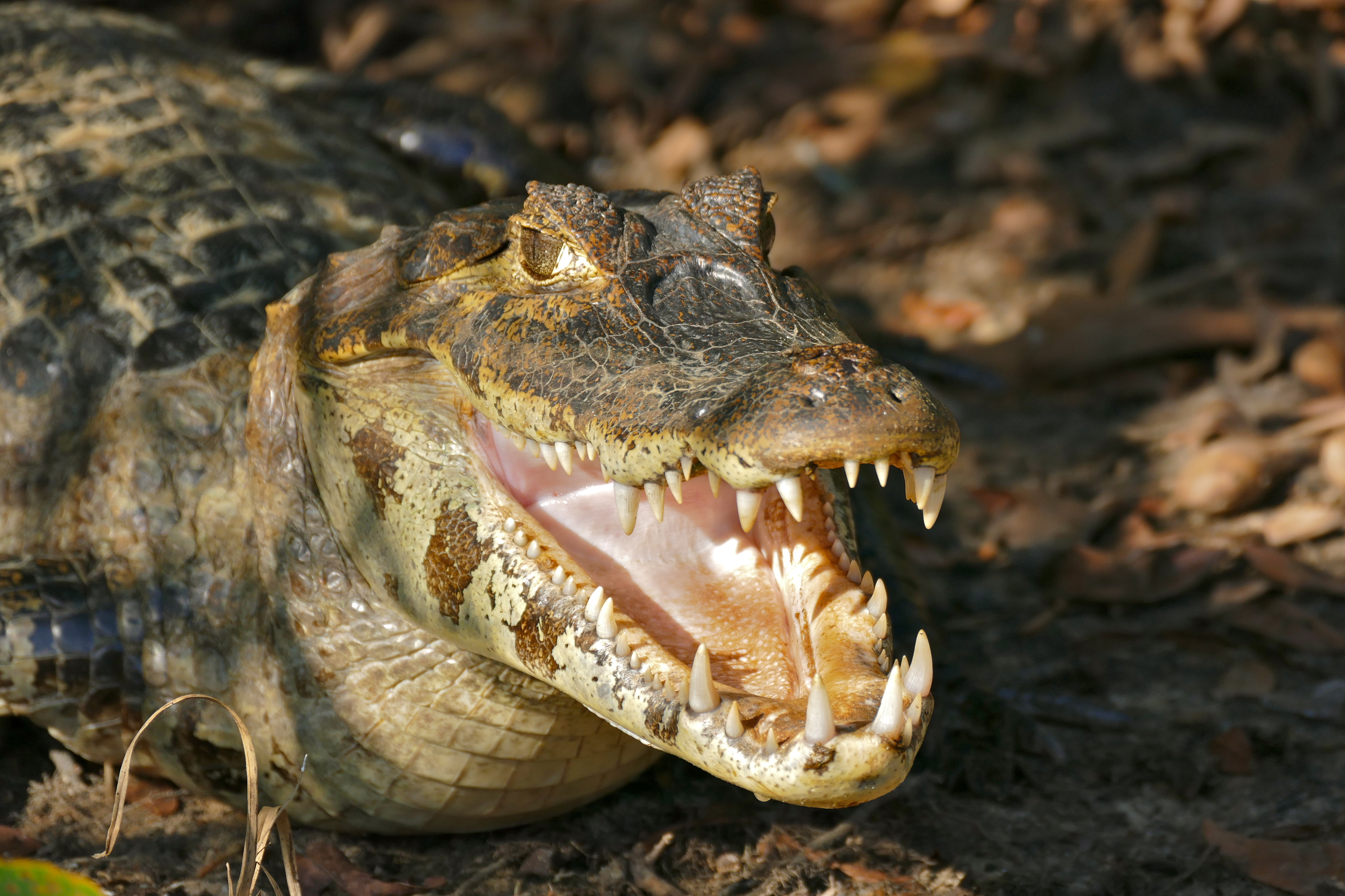 Rio Claro, Transpantaneira, Poconé, Mato Grosso, BRAZIL